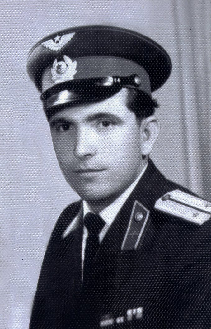 Elmaz Hasamataj